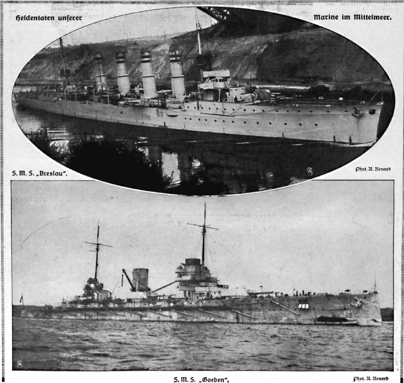 Heldentaten unserer Marine im Mittelmeer. Oben: S. M. S. „Breslau“. Unten: S. M. S. „Goeben“.